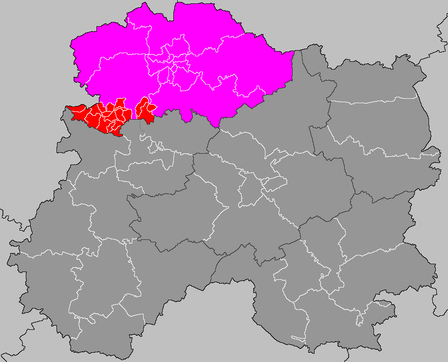 Localisation du canton de Châtillon-sur-Marne